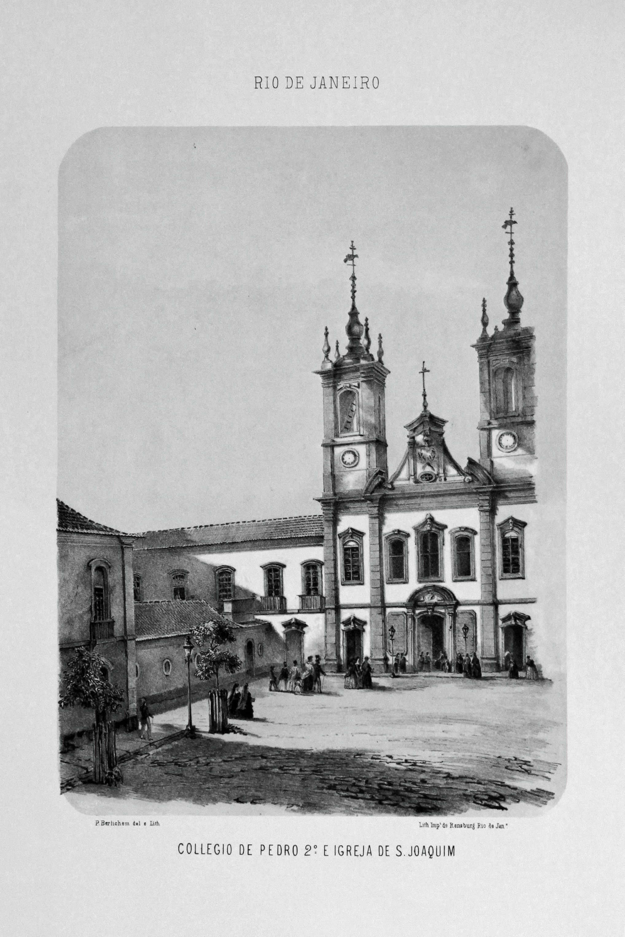 P. G. Bertichem - Colégio Pedro II e Igreja de São Joaquim